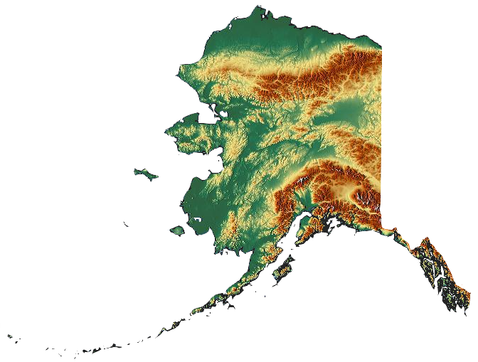 Map of Alaska